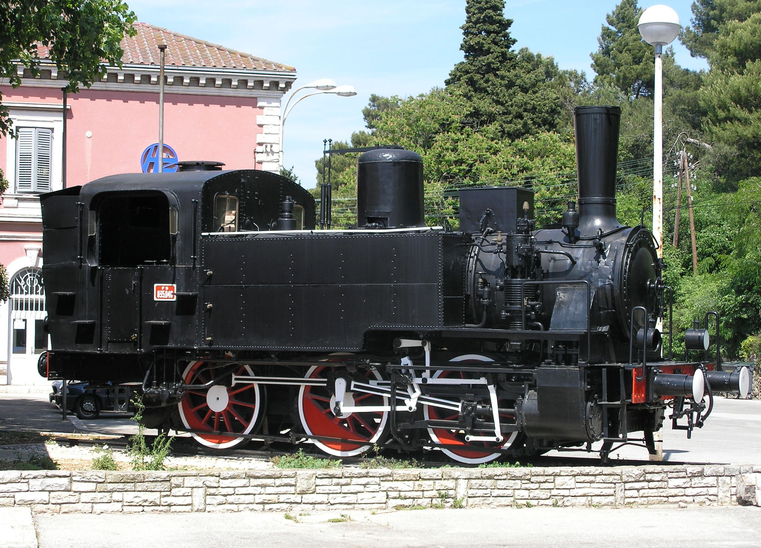 FS 835.040 locomotive in Pola, Croatia